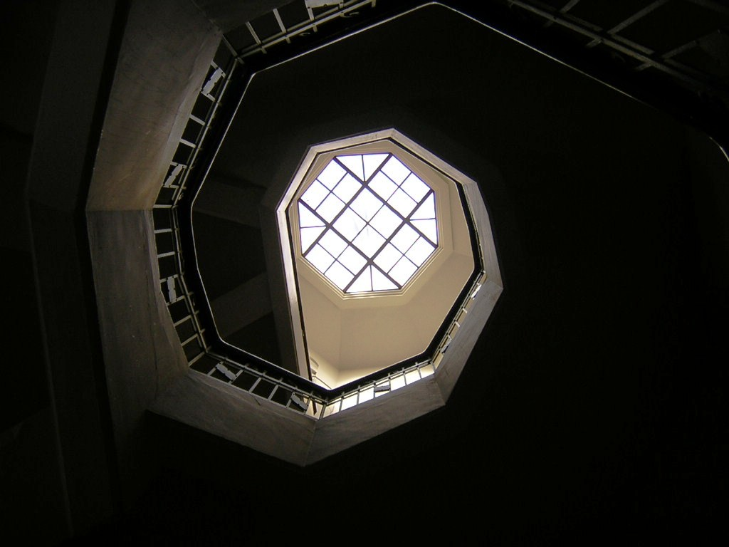 Escalera de Caracol, Facultad de Medicina, Área de la Salud, Universidad de Antioquia, Medellín, Colombia (esta foto la tome yo, y la libero al dominio público)